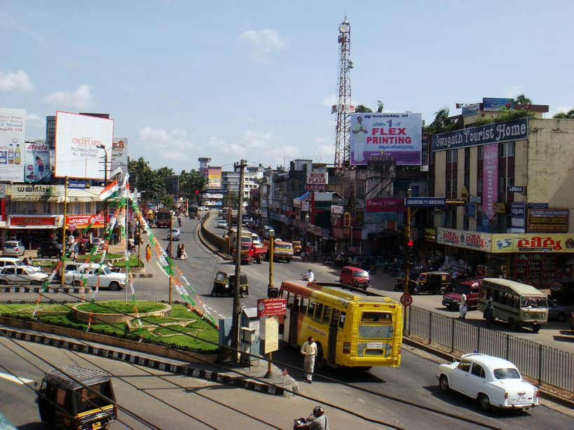 ദേ.പാ. 47 ഉം എം.സി. പാതയും ചേരുന്ന സ്ഥലം